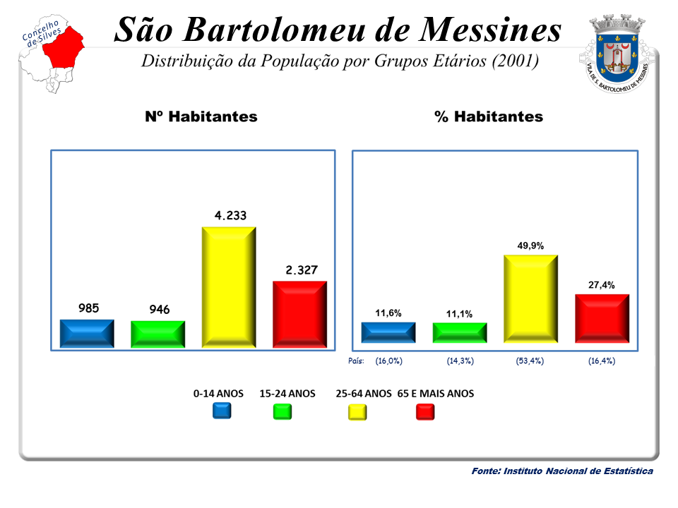 Censos 1864/2011